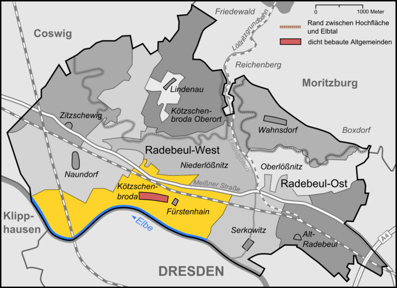 Karte der Stadtteile und Umlandgemeinden Radebeuls, hier Stadtteil Kötzschenbroda ohne Oberort